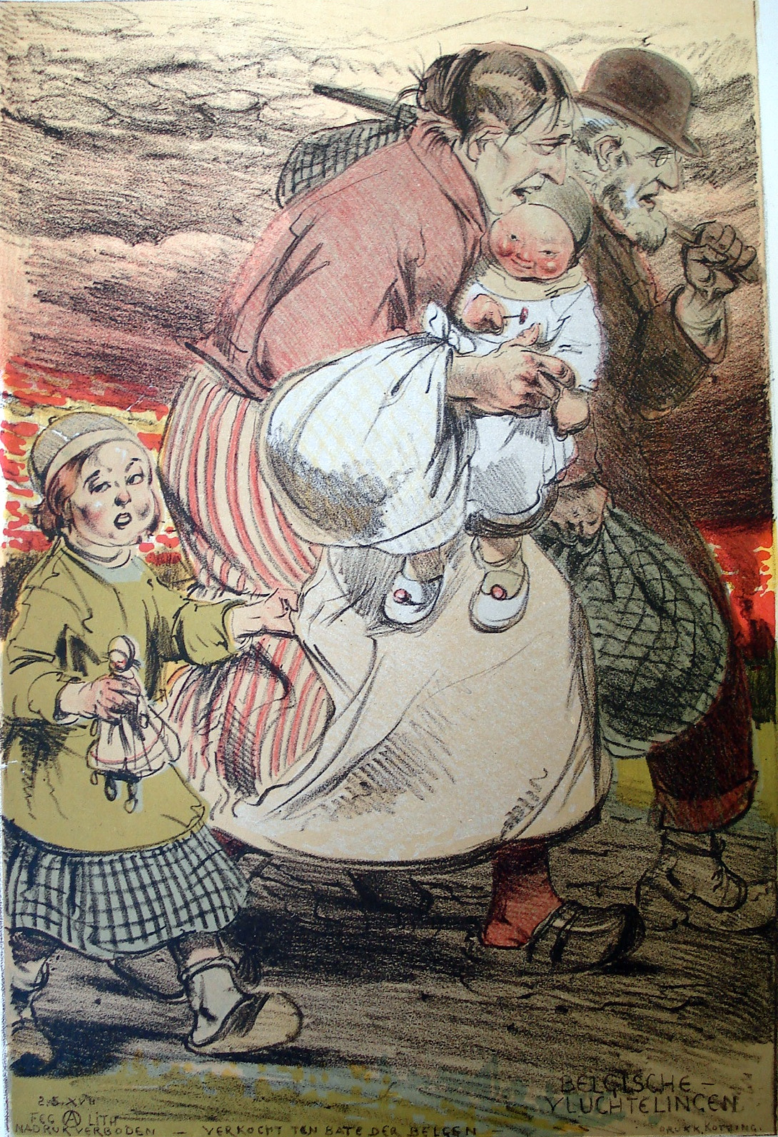 Prent van Alfred Ost, ontstaan in Nederland tussen 1914 en 1918 als steun voor Belgische vluchtelingen tijdens de eerste wereldoorlog.